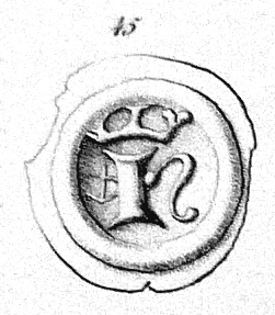 Quarter-Brakteat von Håkon VI. Magnusson, 1355-1380 König von Norwegen. Um 1363 geprägt. 0,256 g. Feingahlt 250 ‰.